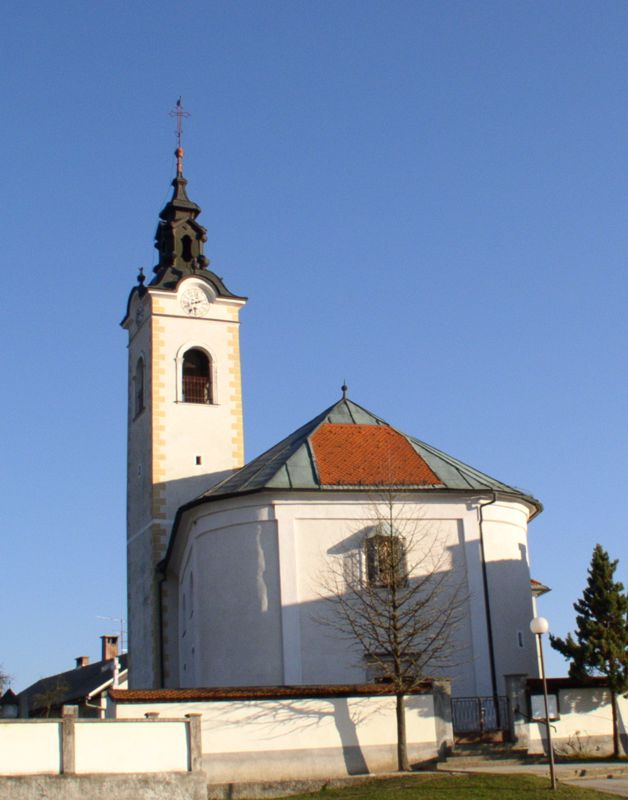 Cerkev svetega Mihaela, Olševek